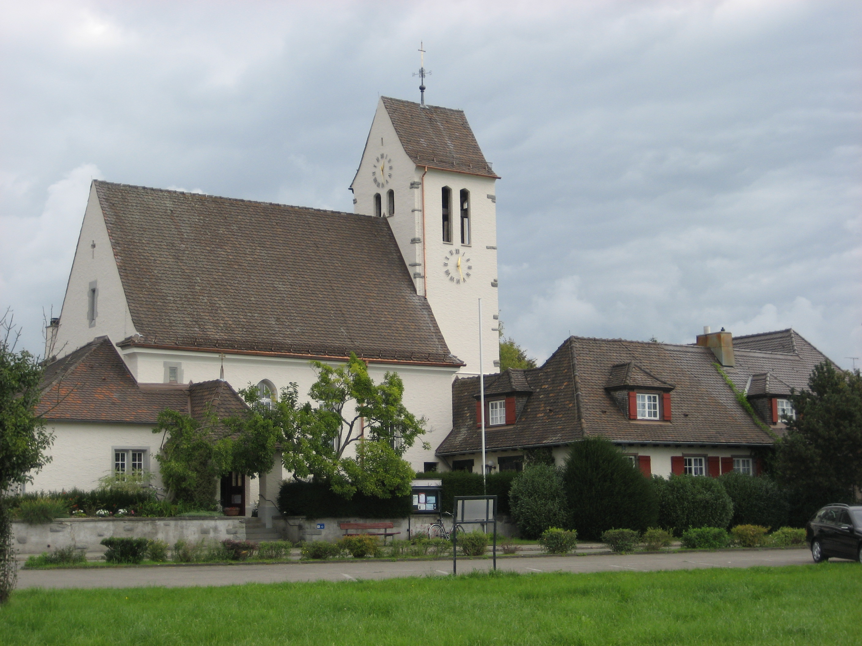 Evangelische Kirche St. Johannes in Wasserburg/Bodensee - Deutschland